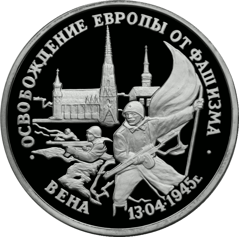 Монета Банка России — Серия: «Великая Отечественная война», 50-летие Победы в Великой Отечественной войне , Вена, 3 рубля, реверс.